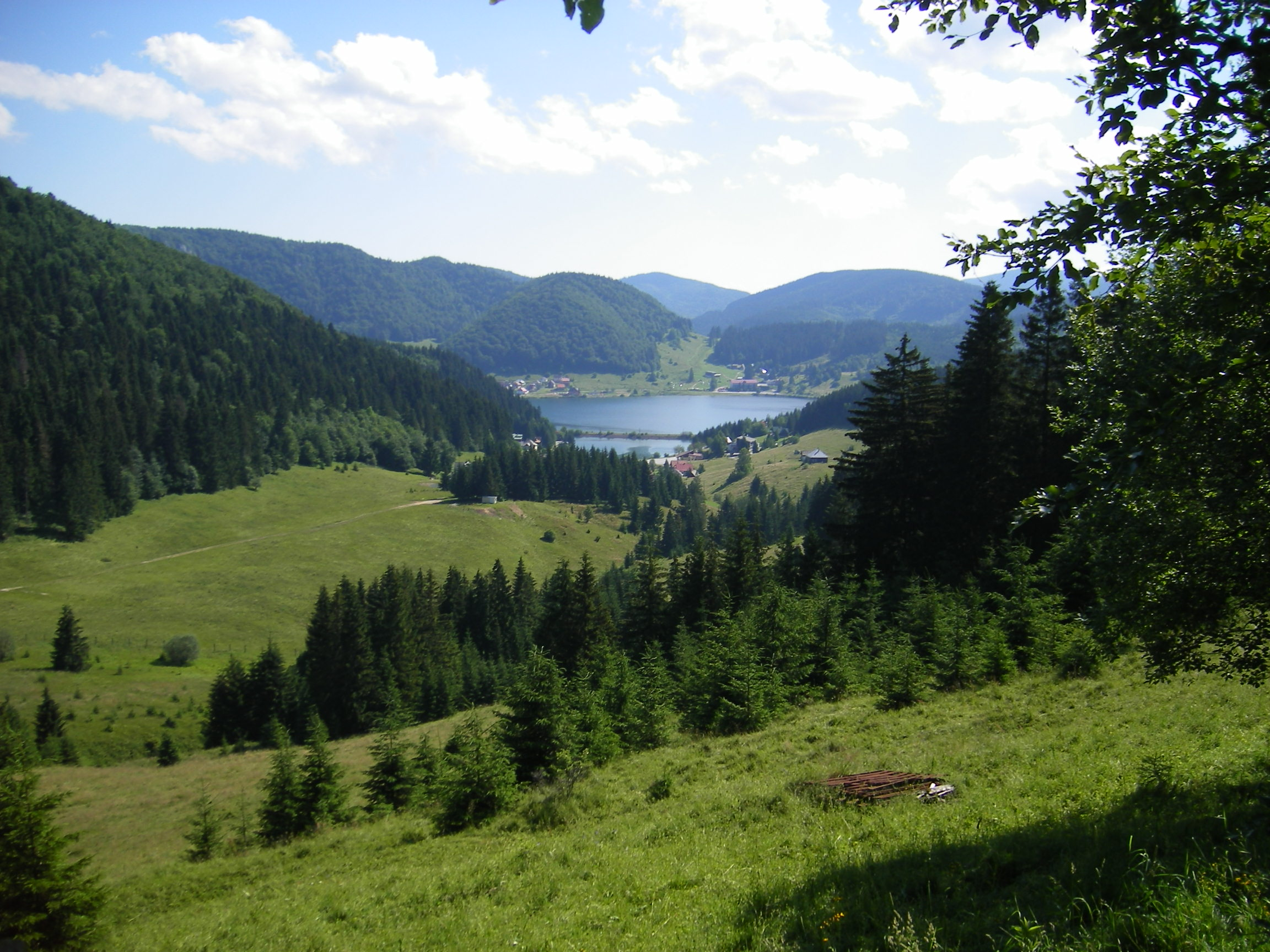 Palcmanská Maša reservoir (okres Rožňava) from road 67